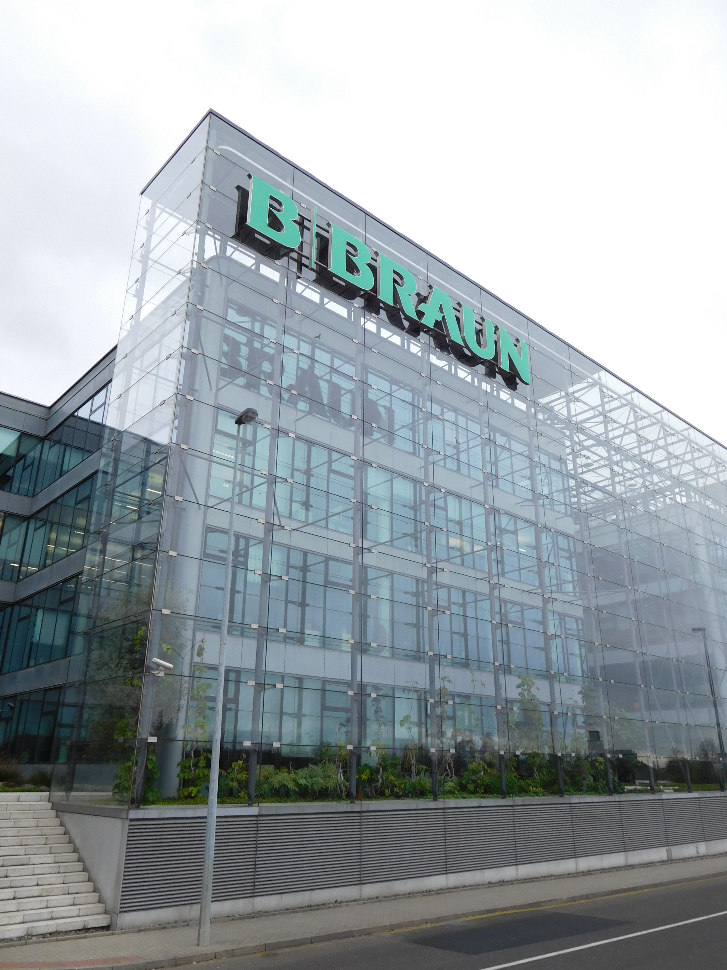 Praha - Chodov, The Park - V Parku 16, B. Braun